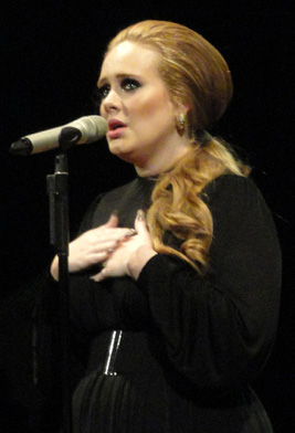 La cantautora ingles Adele interpretando "Someone Like You" durante el concierto que ofreció en Seattle, Washngton, el 12 de agosto de 2011 con motivo de su gira Adele Live.